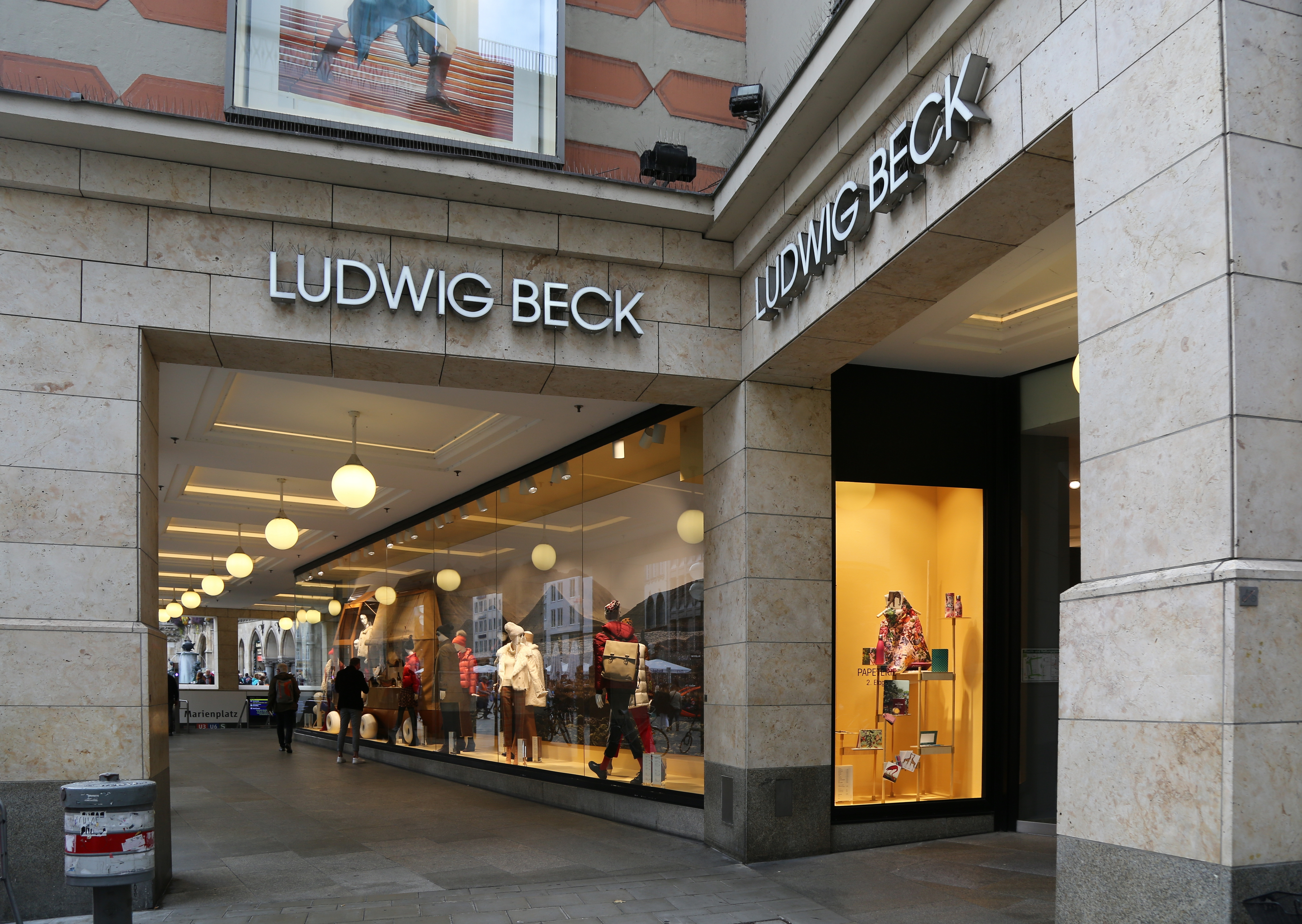 Ludwig Beck am Rauthauseck Filiale in München.